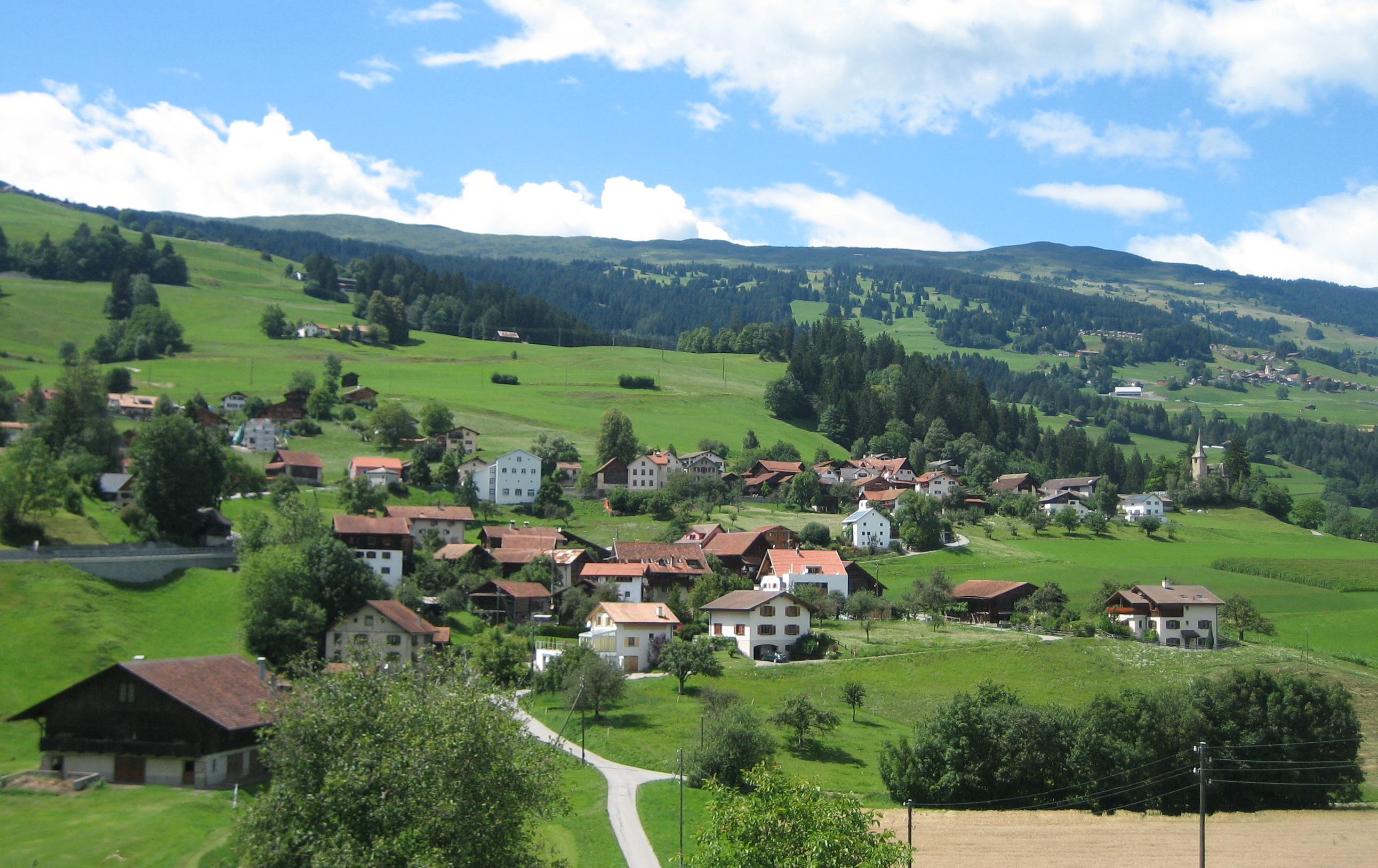 Masein